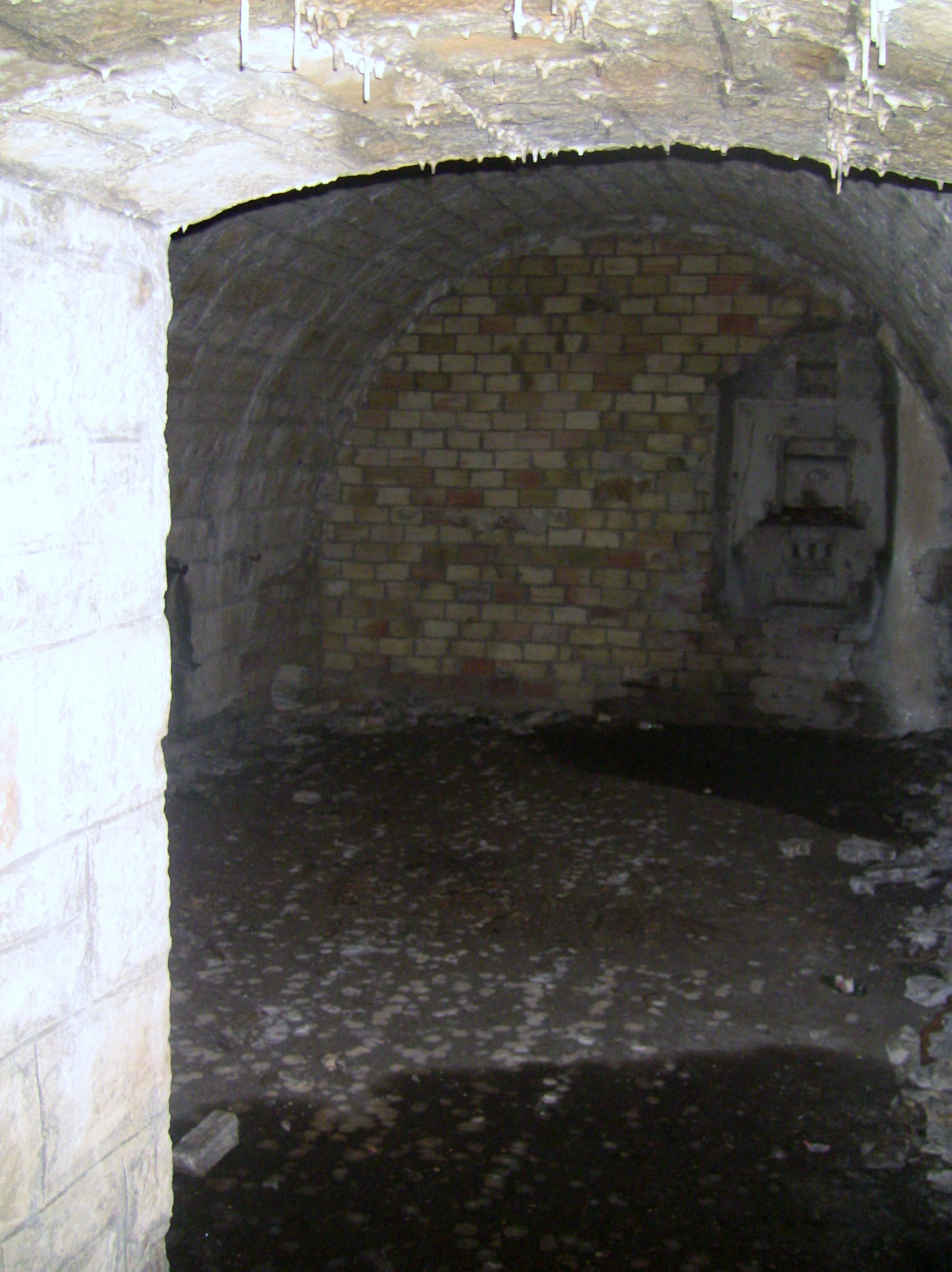 La chambre II du magasin caverne du fort de Planoise, à Besançon (Doubs, France).